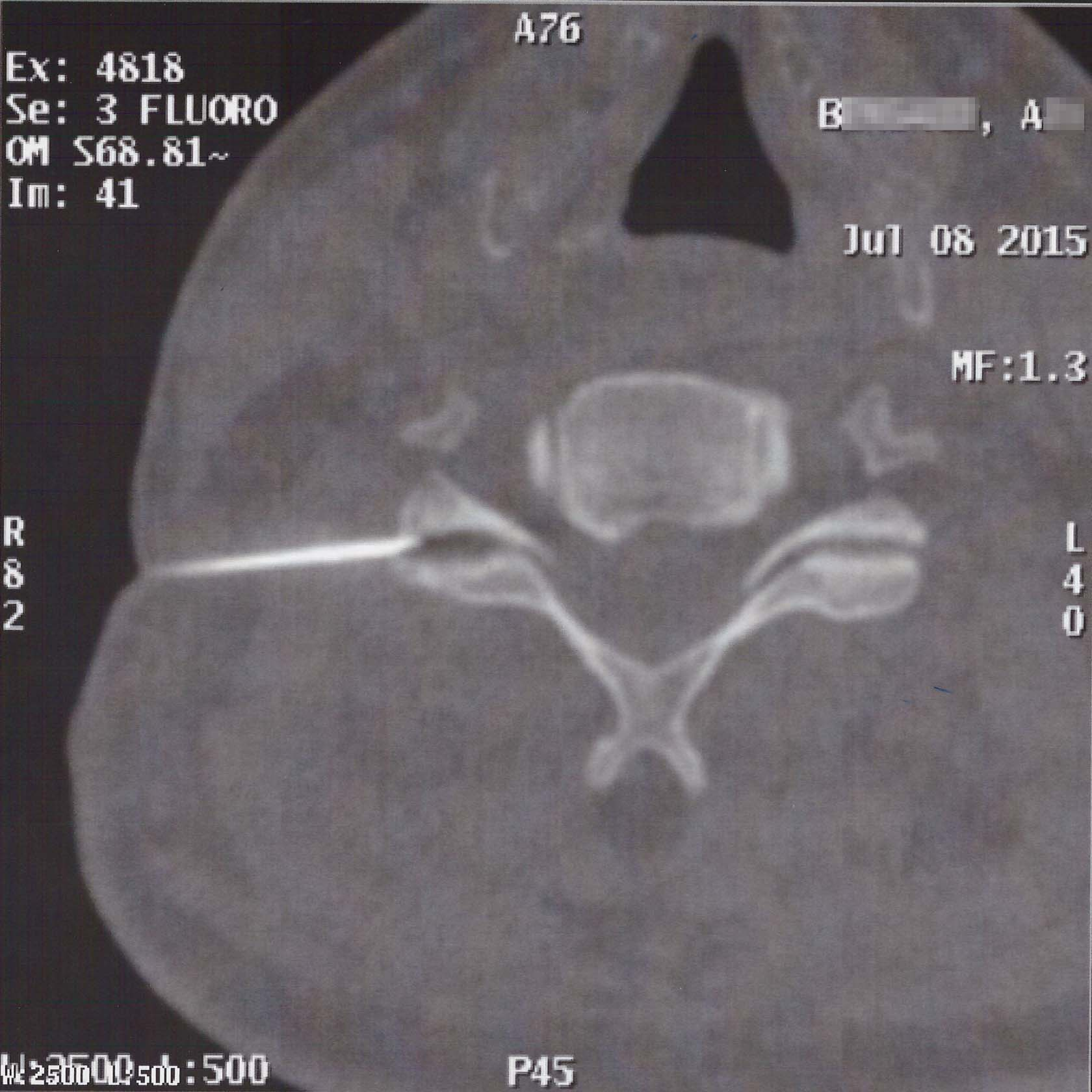 Cliché provenant d'un scanner médical montrant une infiltration articulaire et épidural par voie articulaire postérieure C5-C6 droite sous fluoroscopie scanner (le trait blanc à gauche montre l'aiguille contenant le produit fluorescent et le corticoïde, avancée dans l'espace épidural, le foramen et l'espace radiculaire)